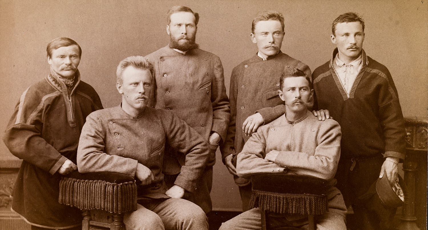 Beskrivelse: Gruppebilde av deltakerne i Fridtjof Nansens ekspedisjon på ski over Grønland. Fotograf: Ludvik Szacinski de Ravics. År: 1889. Arkivhenvisning: Riksarkivet, PA-355 Rønneberg og Krefting, U Foto, 0001 Fotoalbum, 0001 Url